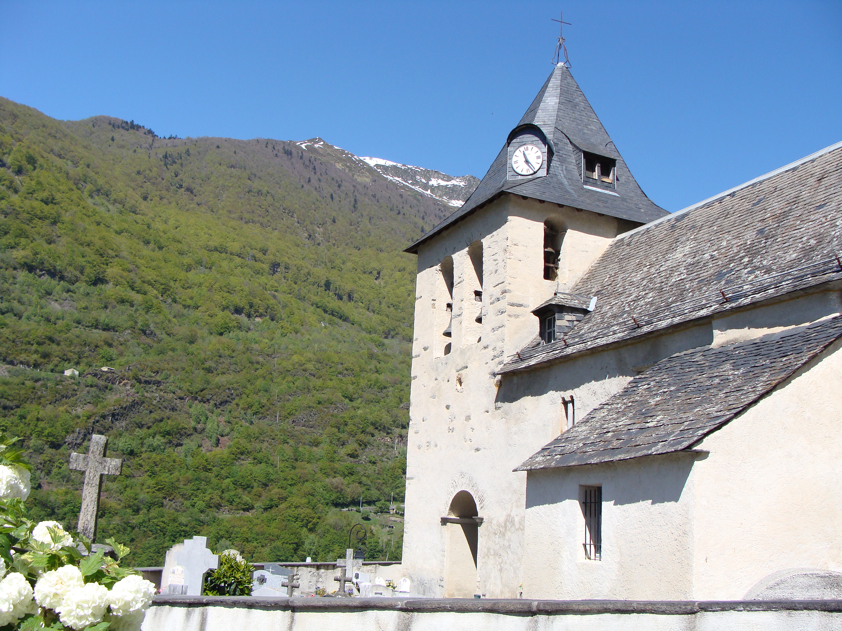 Église de Chéze